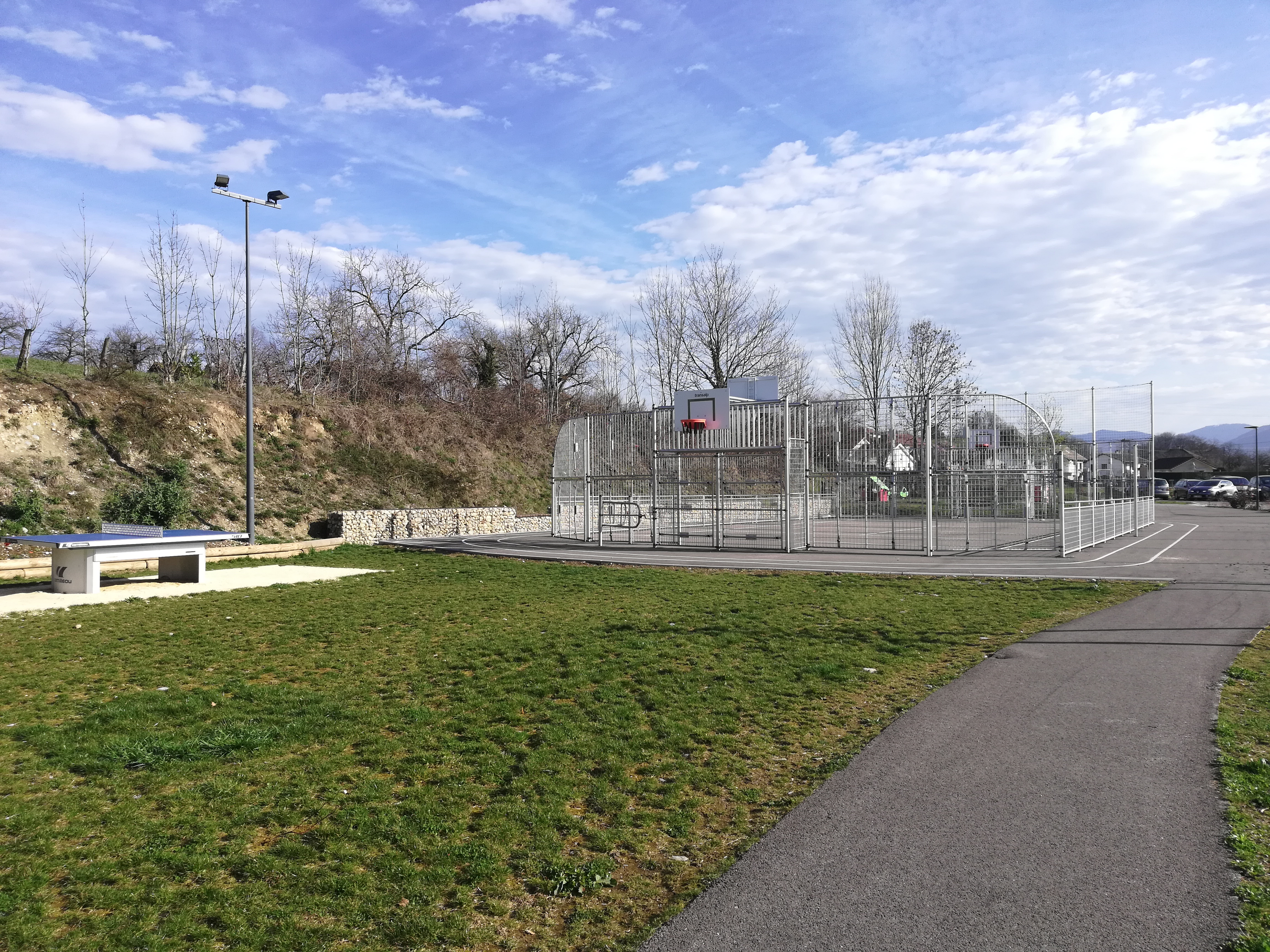 Table de ping-pong et terrain de basket du CITY PARK de Charnècles